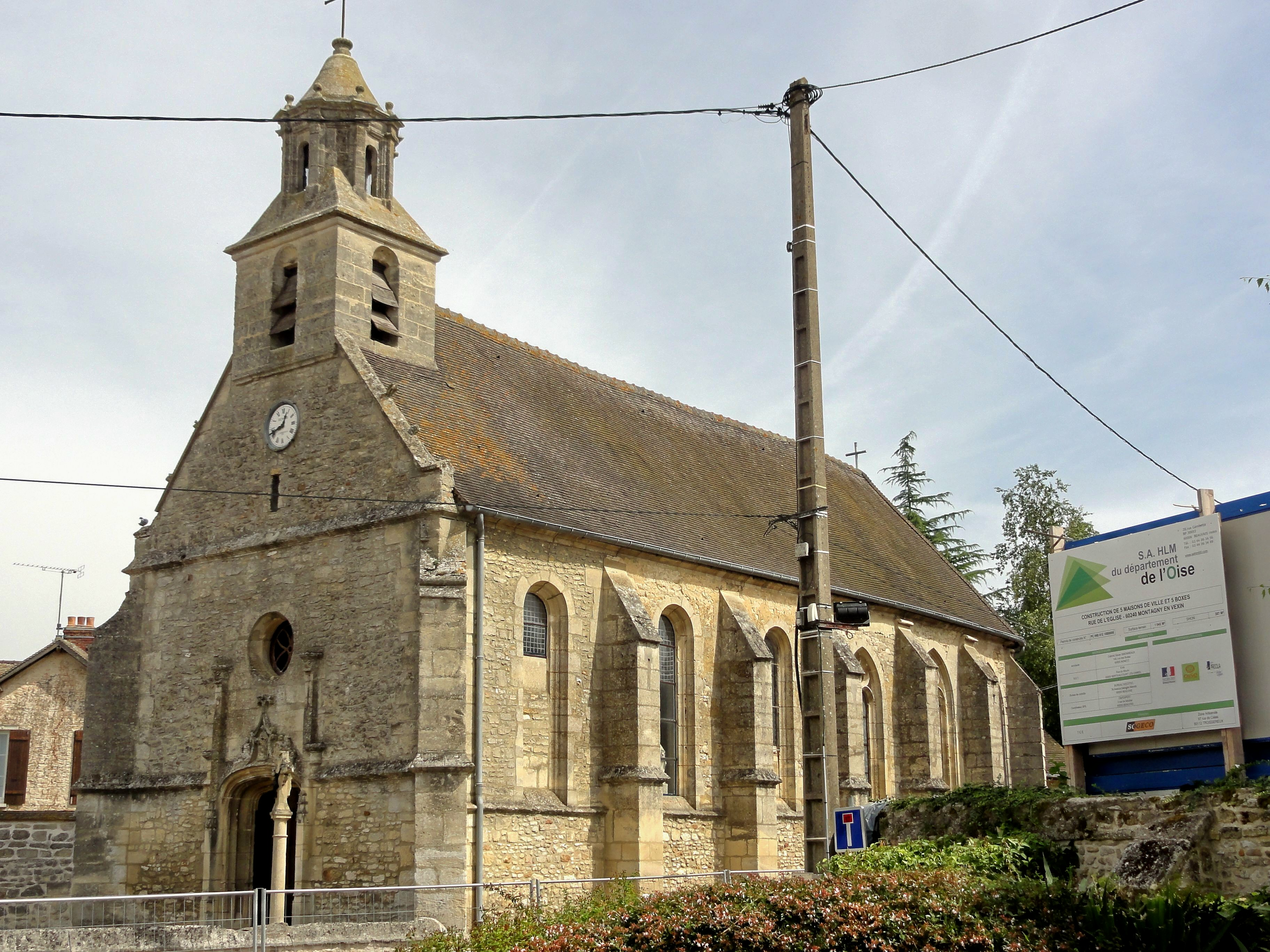 Vue depuis le sud-ouest.